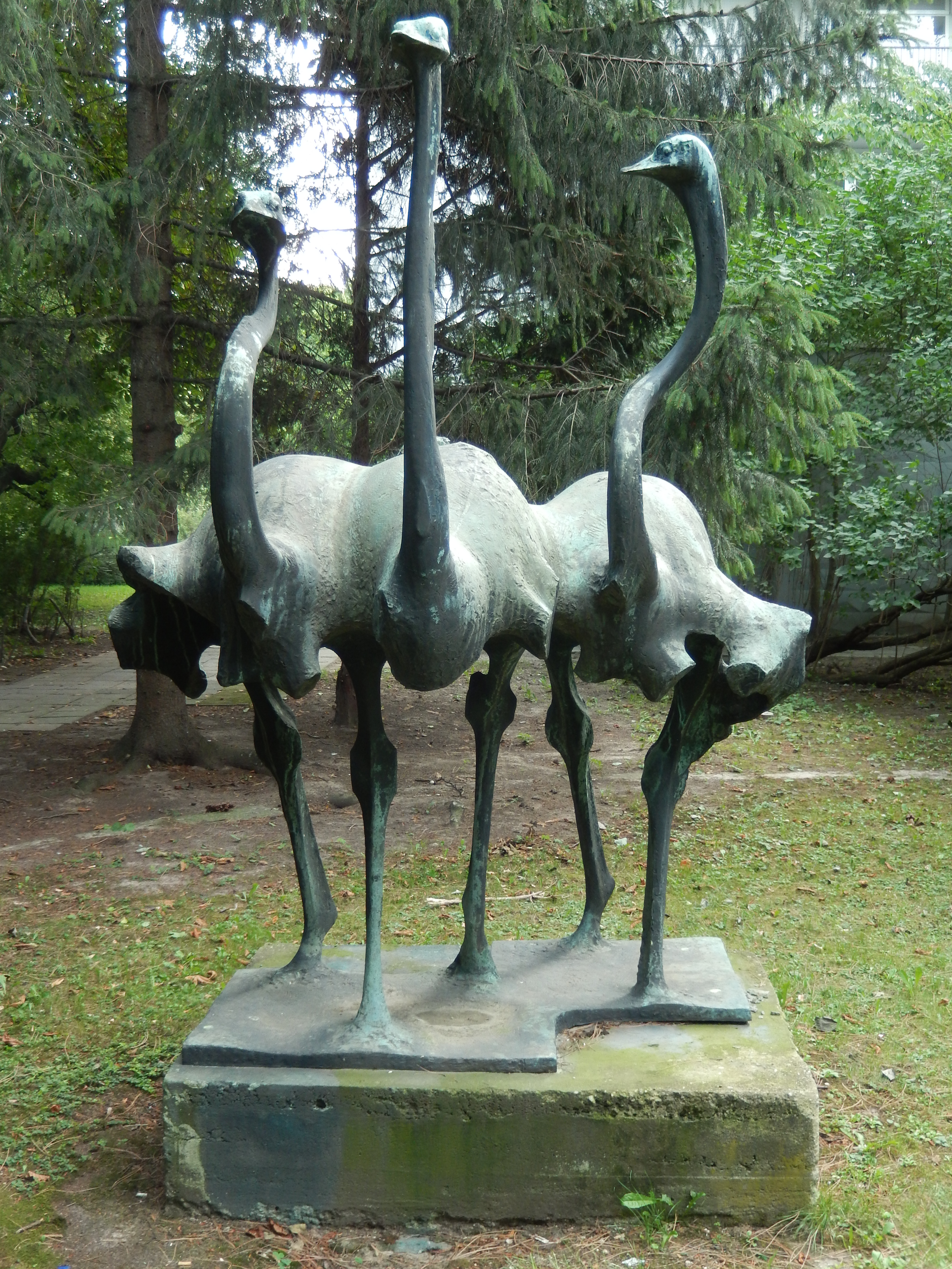 Dresden, Comenius Straße 68, Laufvogelgruppe vom Dresdner Bildhauer Wolfram Hesse.